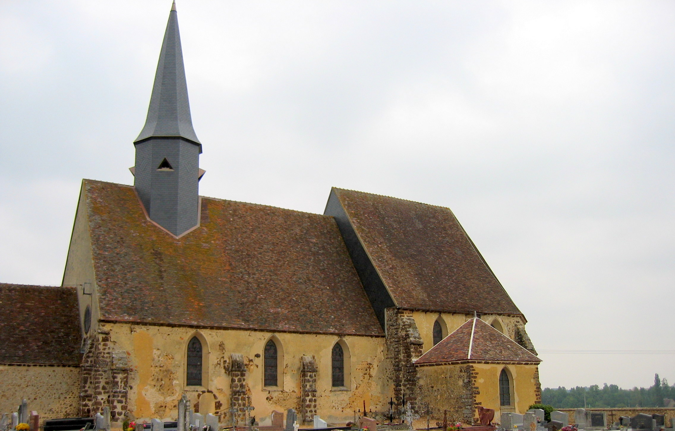 Église Saint-Pierre du Favril, Eure-et-Loir (France).